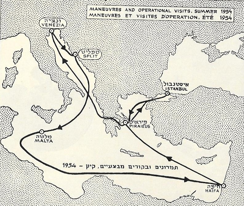 תרשים מבצע תיכון החוזרות מארצות הברית הפלגת הפריגטות של שייטת 1 בקיץ 1954